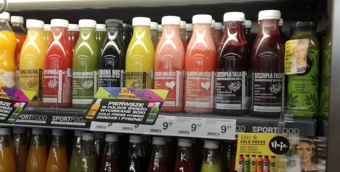 Pierwsze na rynku Polskim soki cold press